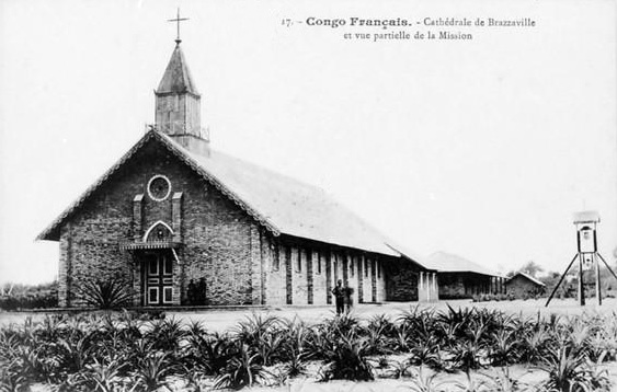 Cathédrale de Brazzaville et vue partielle de la mission. 116 cartes postales du Congo français, don 1907.